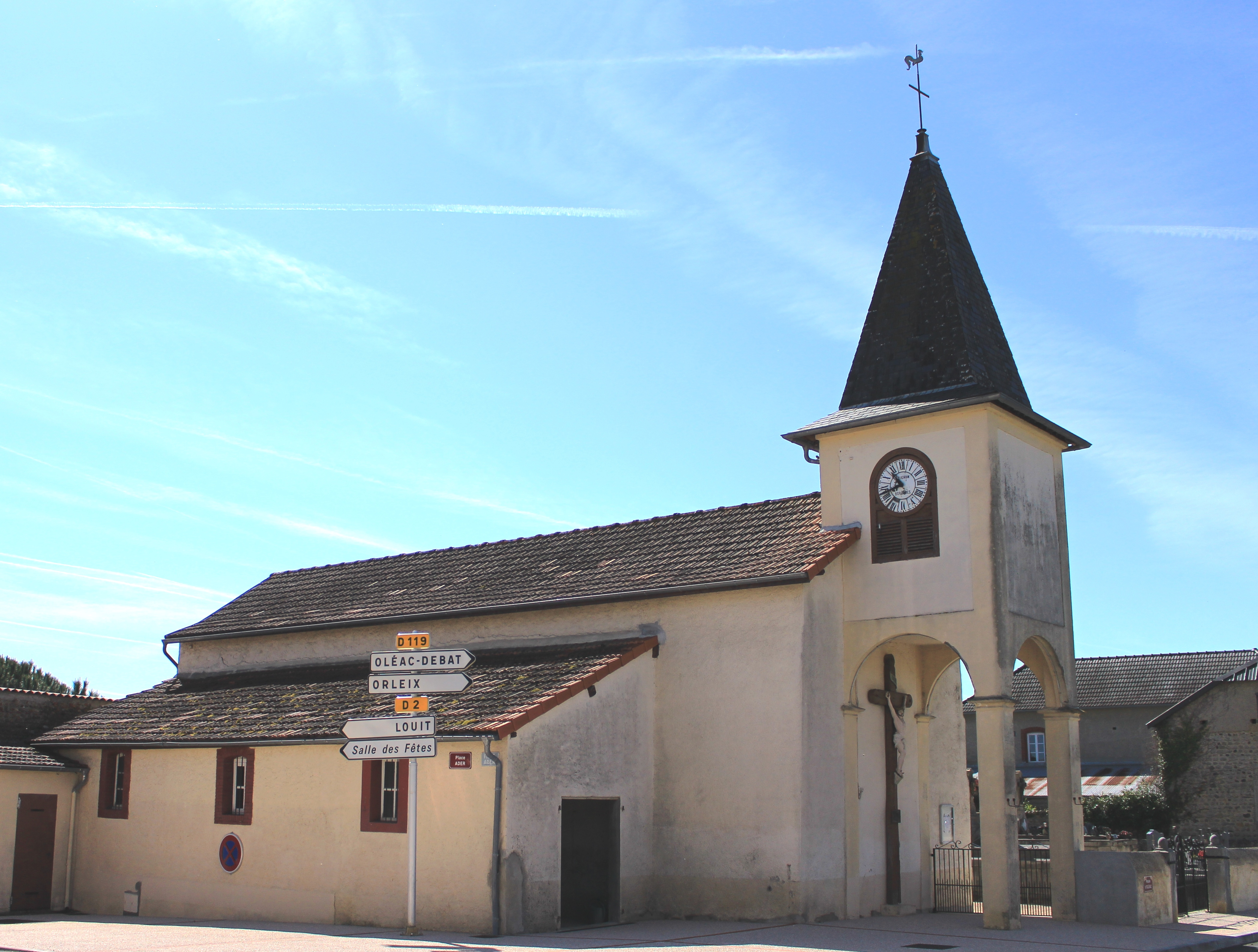 Église Saint-Martin de Sabalos (Hautes-Pyrénées)